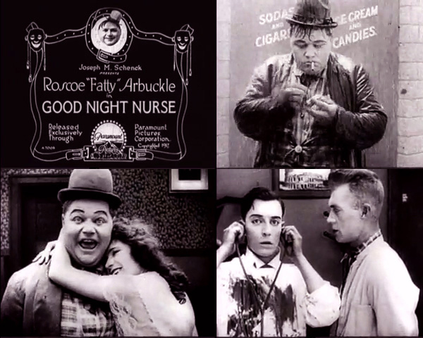 Snapshot d'un film dans le domaine Public : Good Night, Nurse! (1918).